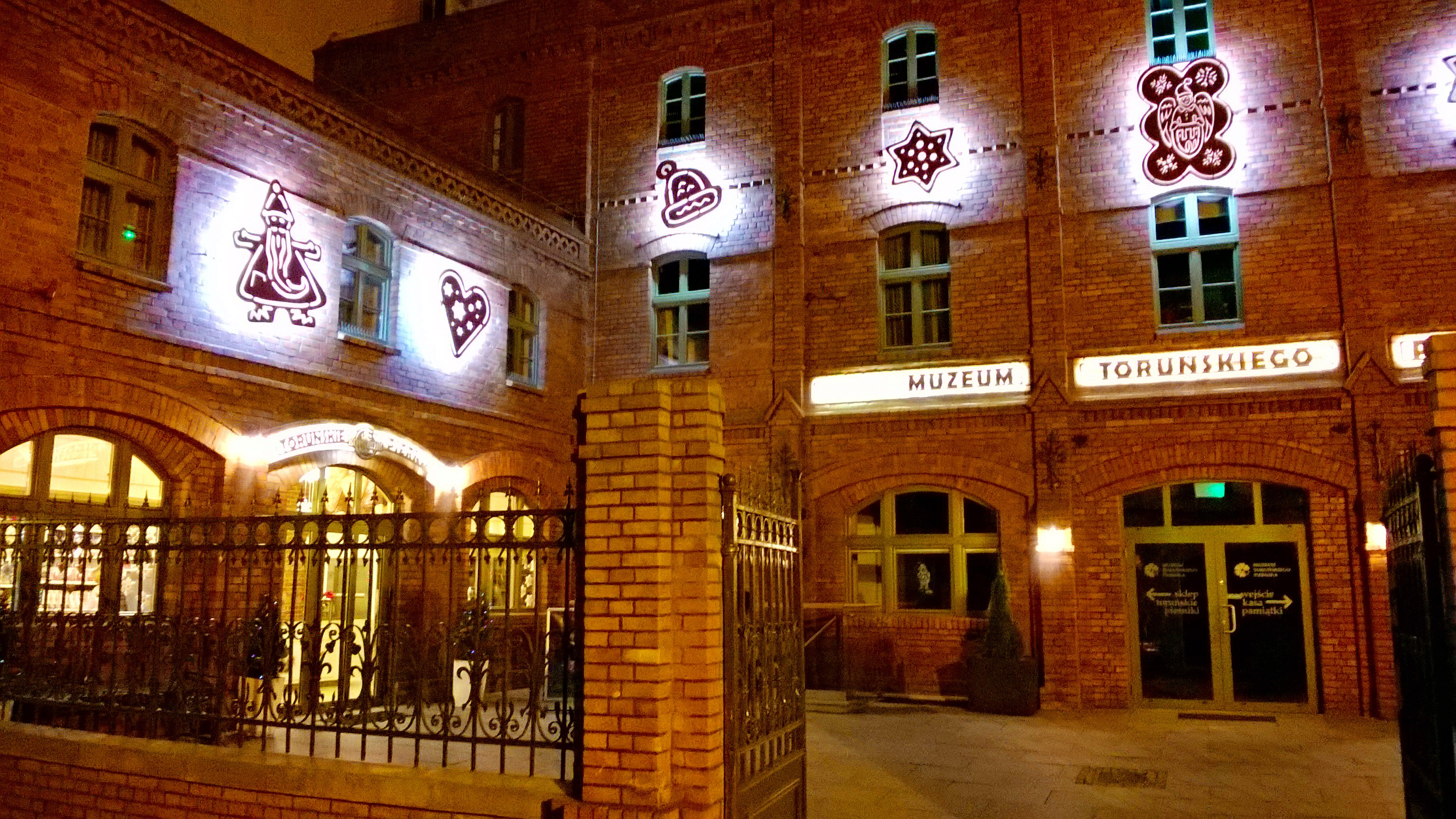 Muzeum Toruńskiego Piernika22